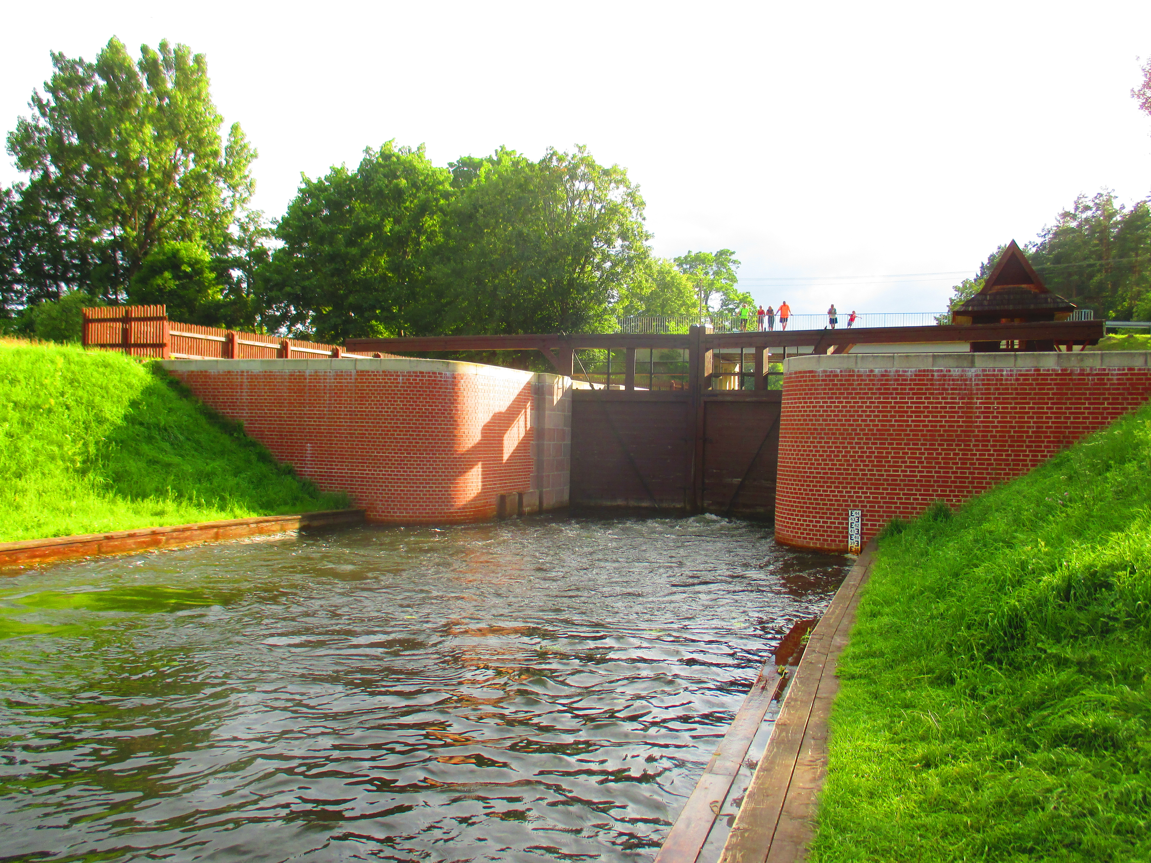 Widok na dolne wrota śluzy Mikaszówka